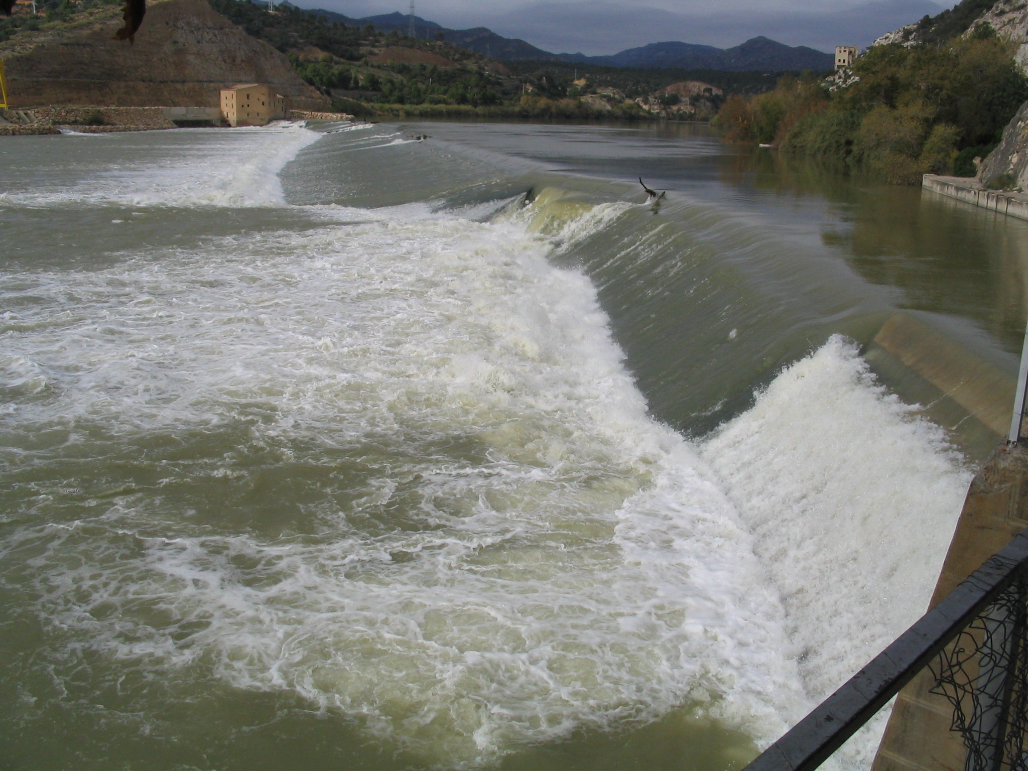 L'Assut de Xerta - any 2003